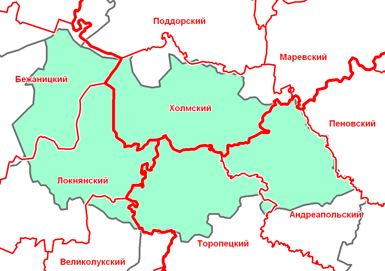 Холмский уезд Псковской губернии в современной сетке районов